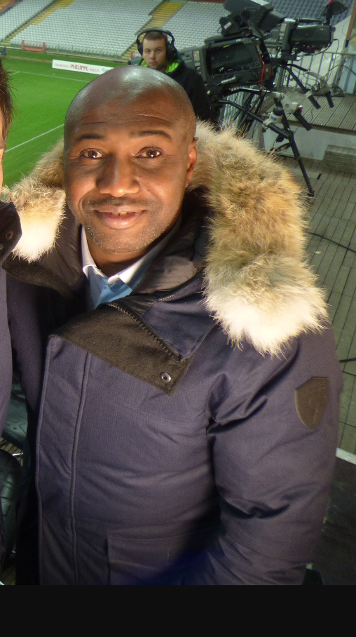 Robert Malm en 2018